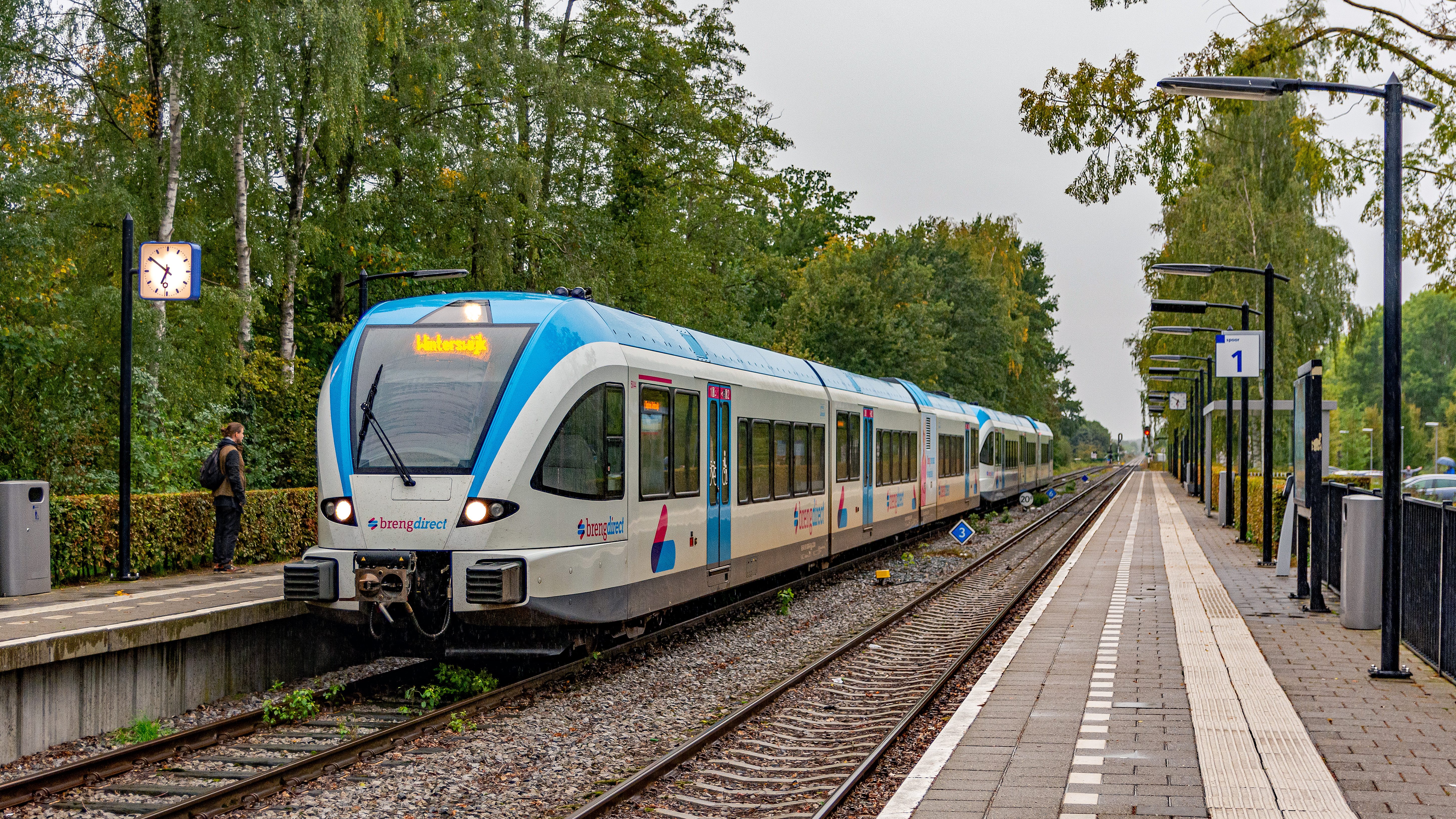 Vervoerder Breng kampt al weken met uitval van treinen door technische storingen. Monteurs van Stadler, de leverancier, zijn volgens de vervoerder met man en macht bezig om alle treinen werkend te krijgen. Breng heeft zeven treinen beschikbaar op het traject Arnhem - Doetinchem, waarvan er in de spits maximaal zes nodig zijn. Tevens heeft de vervoerder op dit moment twee treinen (5044 en 5041) verhuurd aan Arriva. Ook bij het stel 5041 doen zich de problemen voor, doordat één dieselmotor steeds uitvalt. Deze mag daarom niet meer solo op Tiel rijden, omdat hij de rijtijd niet kan halen. Op de lijn naar Tiel zijn twee gekoppelde exemplaren van de DMU 2/8 teveel van het goede. Het Breng duo werd daarom samen aangetroffen op dinsdag 24 september, als stoptrein 30959 naar Winterswijk. Hier zien we het tweetal op station Varsseveld.